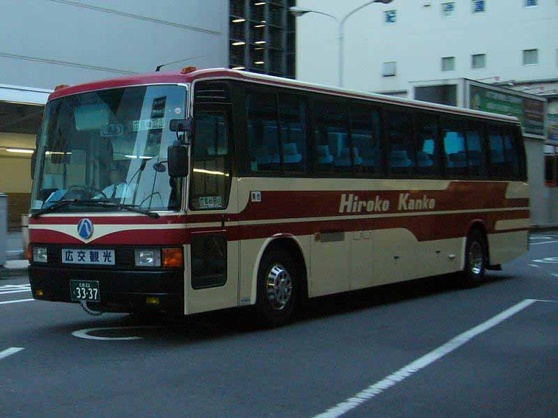 登録番号 広島22く33-37 広交観光所属 サンサンライナー用 2006年10月3日 広島バスセンターにて撮影